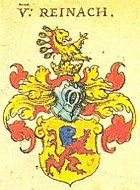 Johann Siebmacher: New Wappenbuch eingescannt aus: Horst Appuhn (Hrsg.), Johann Siebmachers Wappenbuch. Die bibliophilen Taschenbücher 538, 2. verb. Aufl , Dortmund 1989 Rheinische Blatt 124